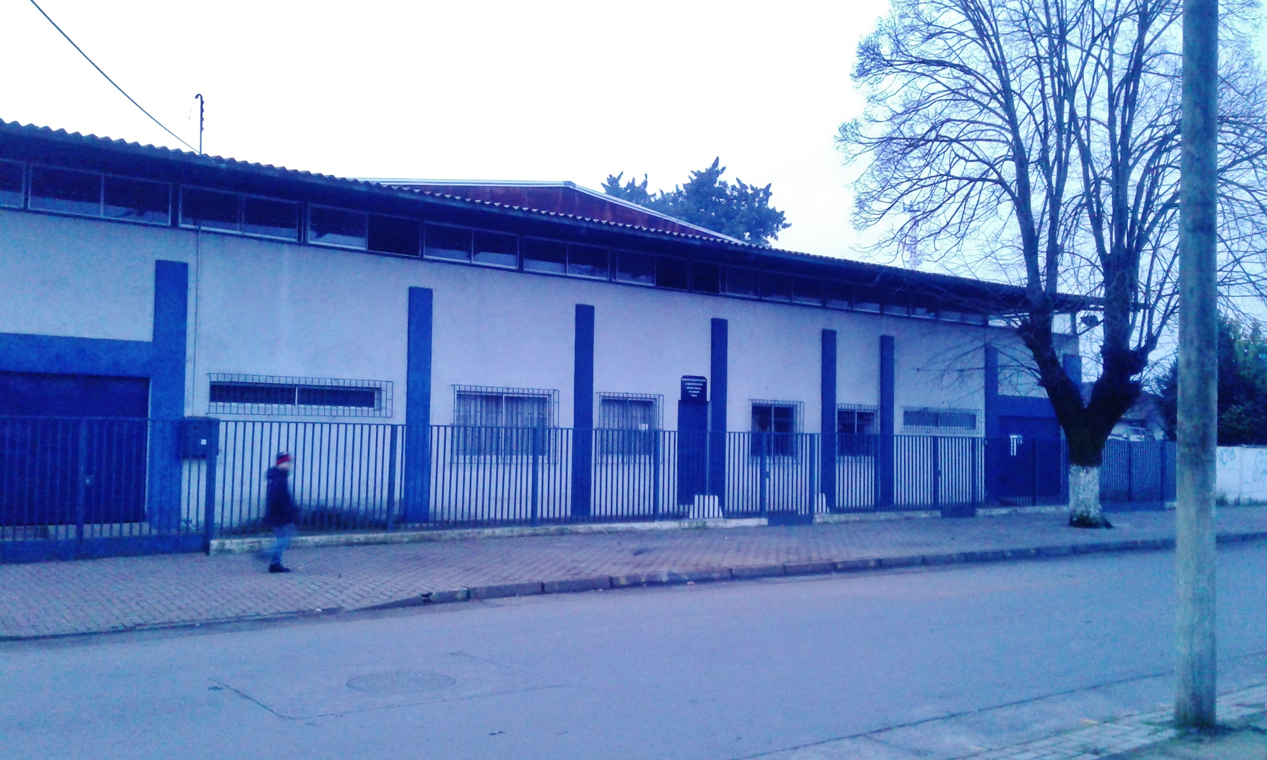 Gimnasio.